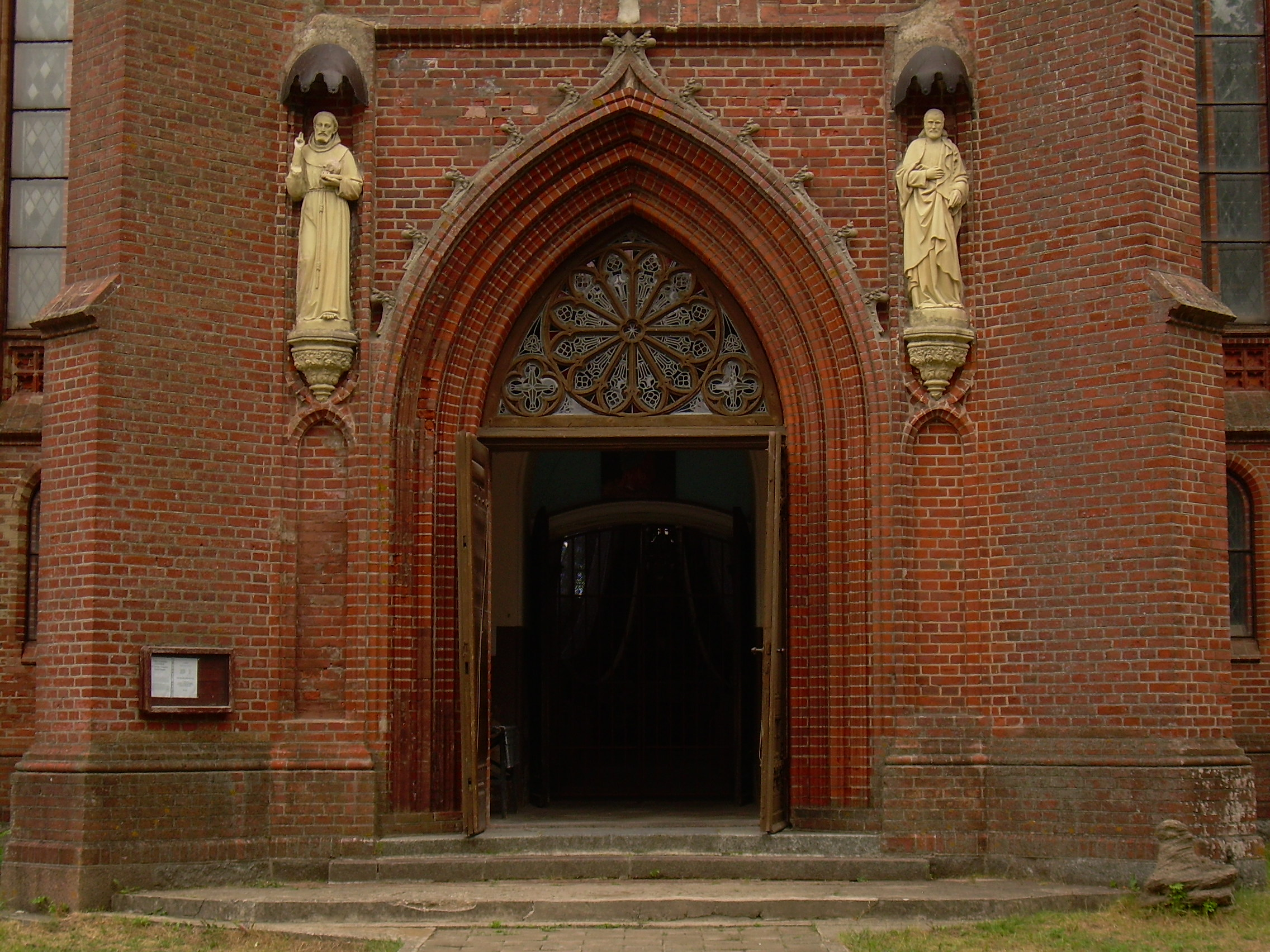 Šateikių Šv. evangelisto Morkaus bažnyčia